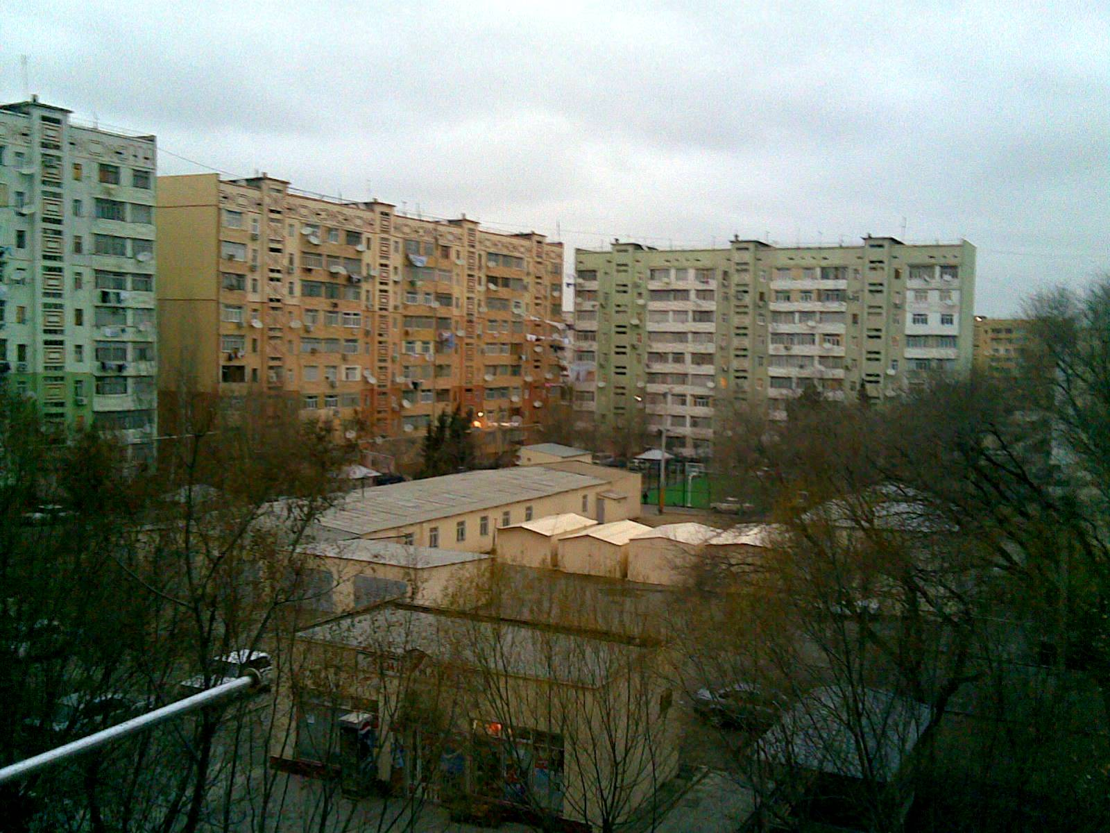 Sumqayıt, 10-cu mik